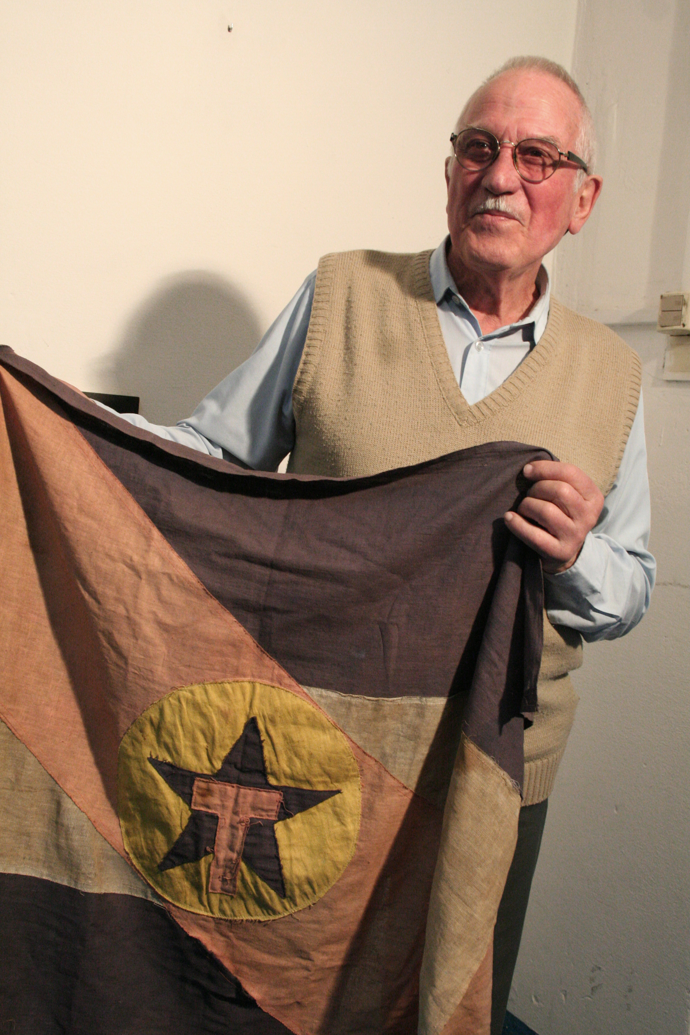 Fotografía del diregente histórico del MLN-Tupamaros, Julio Marenales, tomada el 23/10/2011 en el local central del MPP (Mercedes 1368, Montevideo)